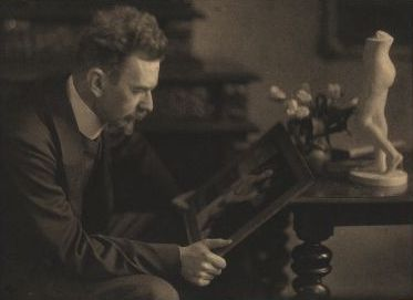 Heinrich Wölfflin (1864–1945), deutscher Kunsthistoriker